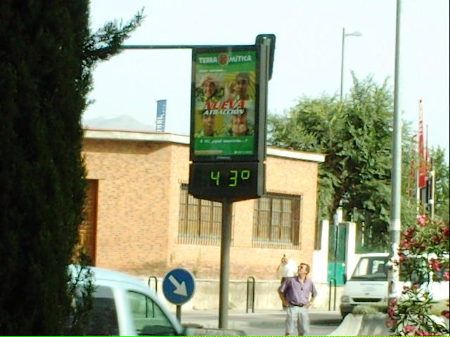 한 여름 스페인에서 찍은 사진.